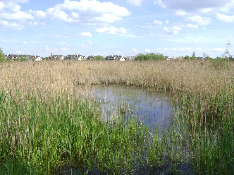 Radom - Ług Gołębiowski